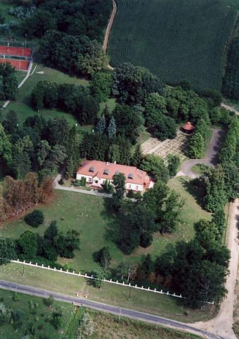 alsómocsólád